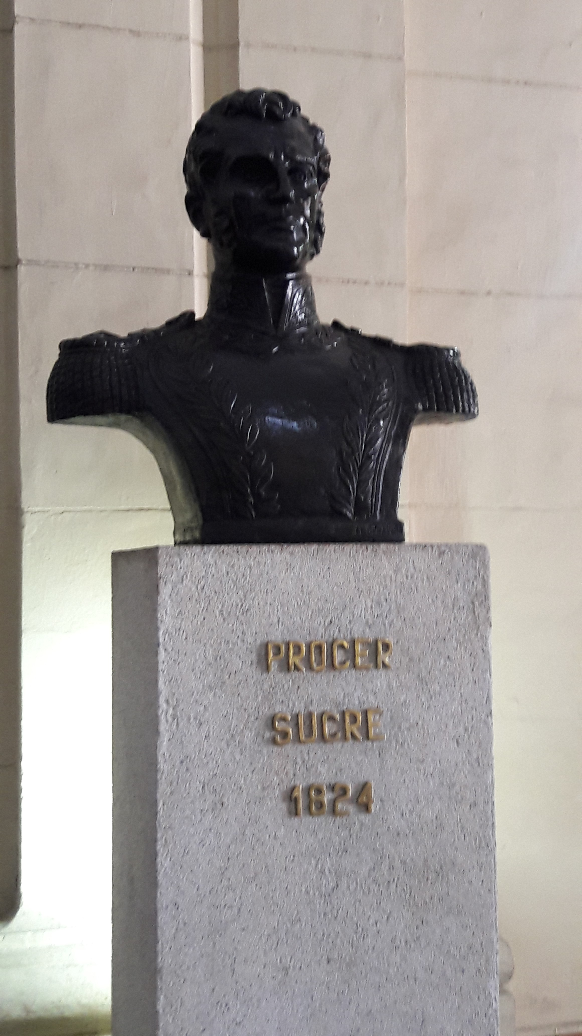 Prócer Sucre 1824